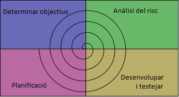 Modificat amb el paint